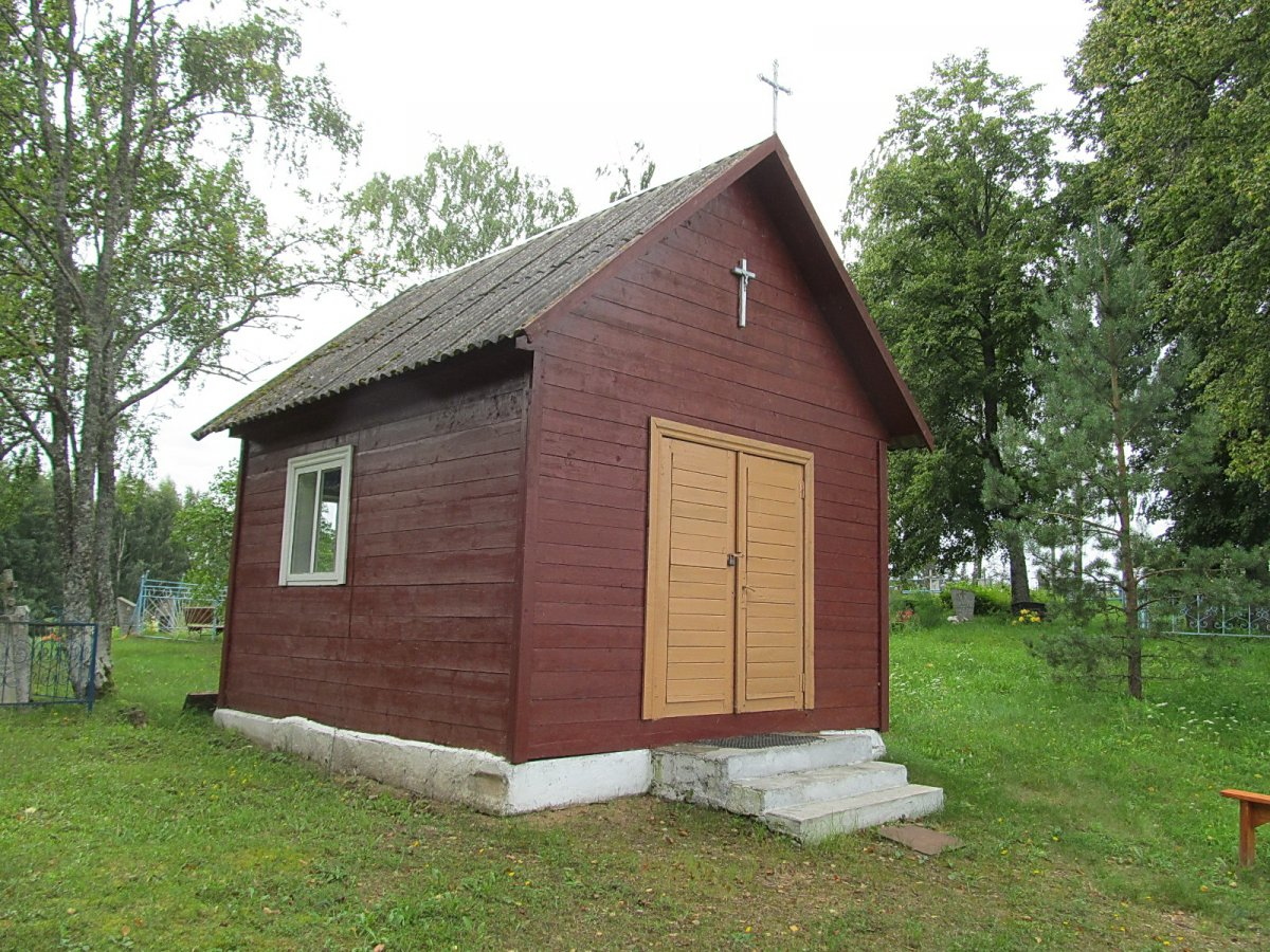 Хутар Дзедзіна. Капліца на могілках